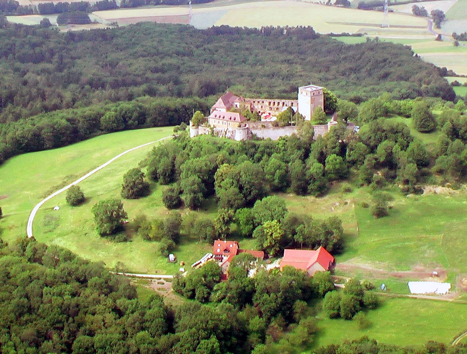 Giechburg aus der Vogelperspektive